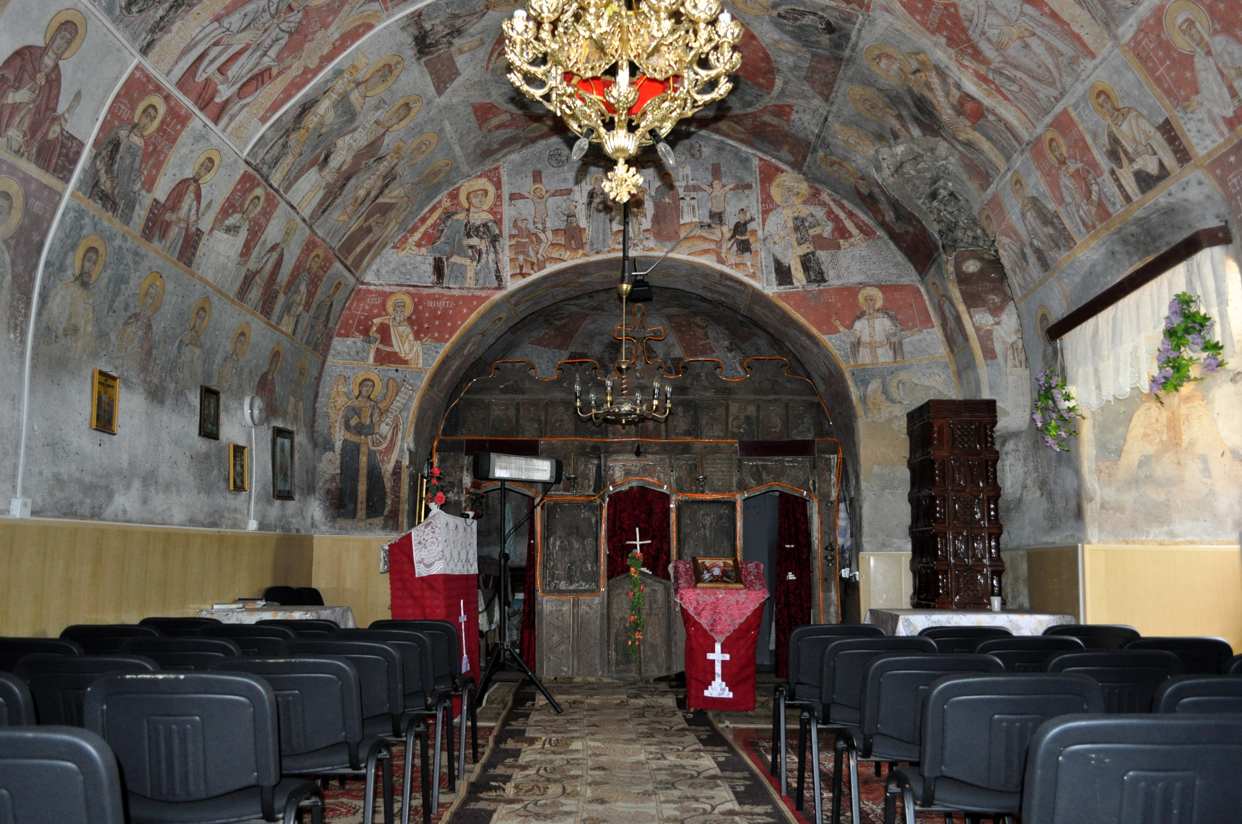 Biserica "Înălţarea Domnului" , sat NUCŞOARA; comuna SĂLAŞU DE SUS